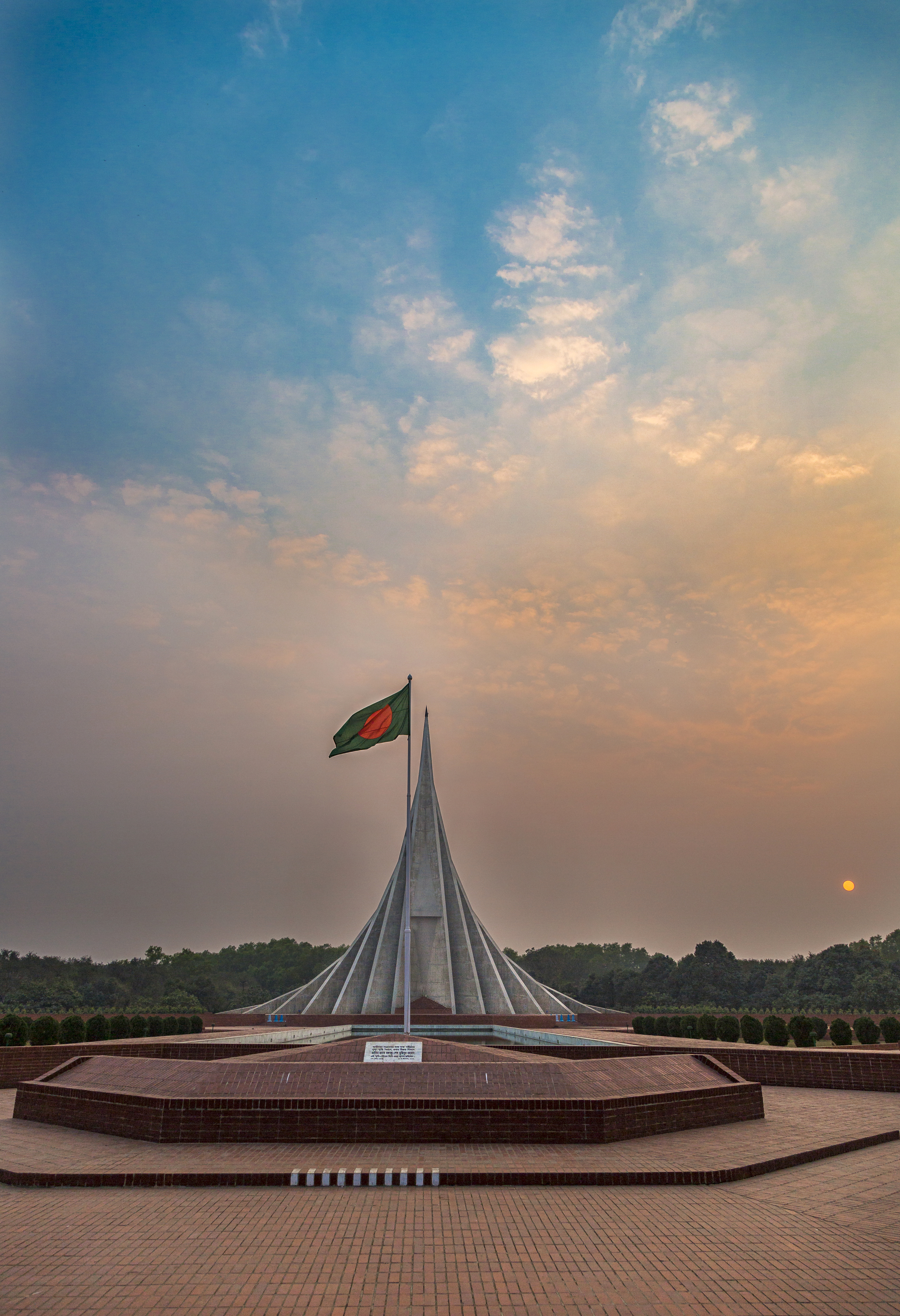 জাতীয় স্মৃতিসৌধ